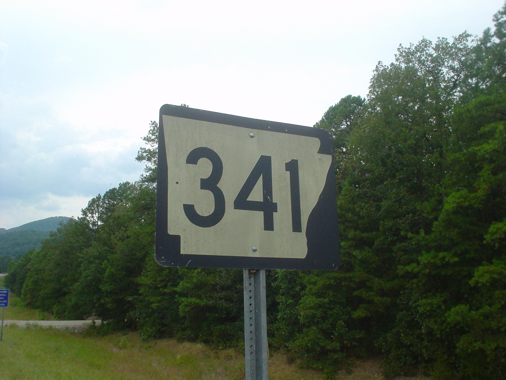 Arkansas Highway 341 sign along its route